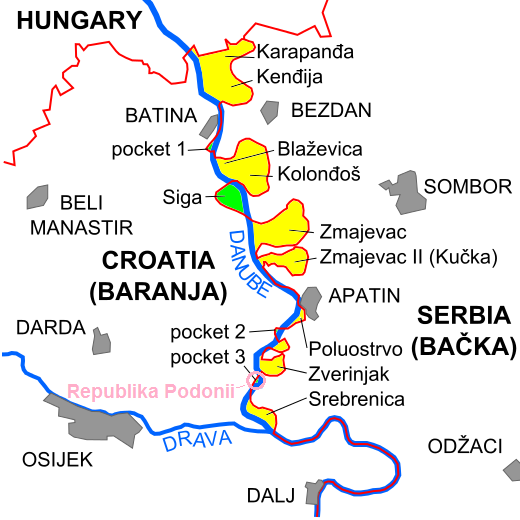 Mapa terenów spornych między Chorwacją a Serbią z zaznaczonym terytorium Republiki Podonii.